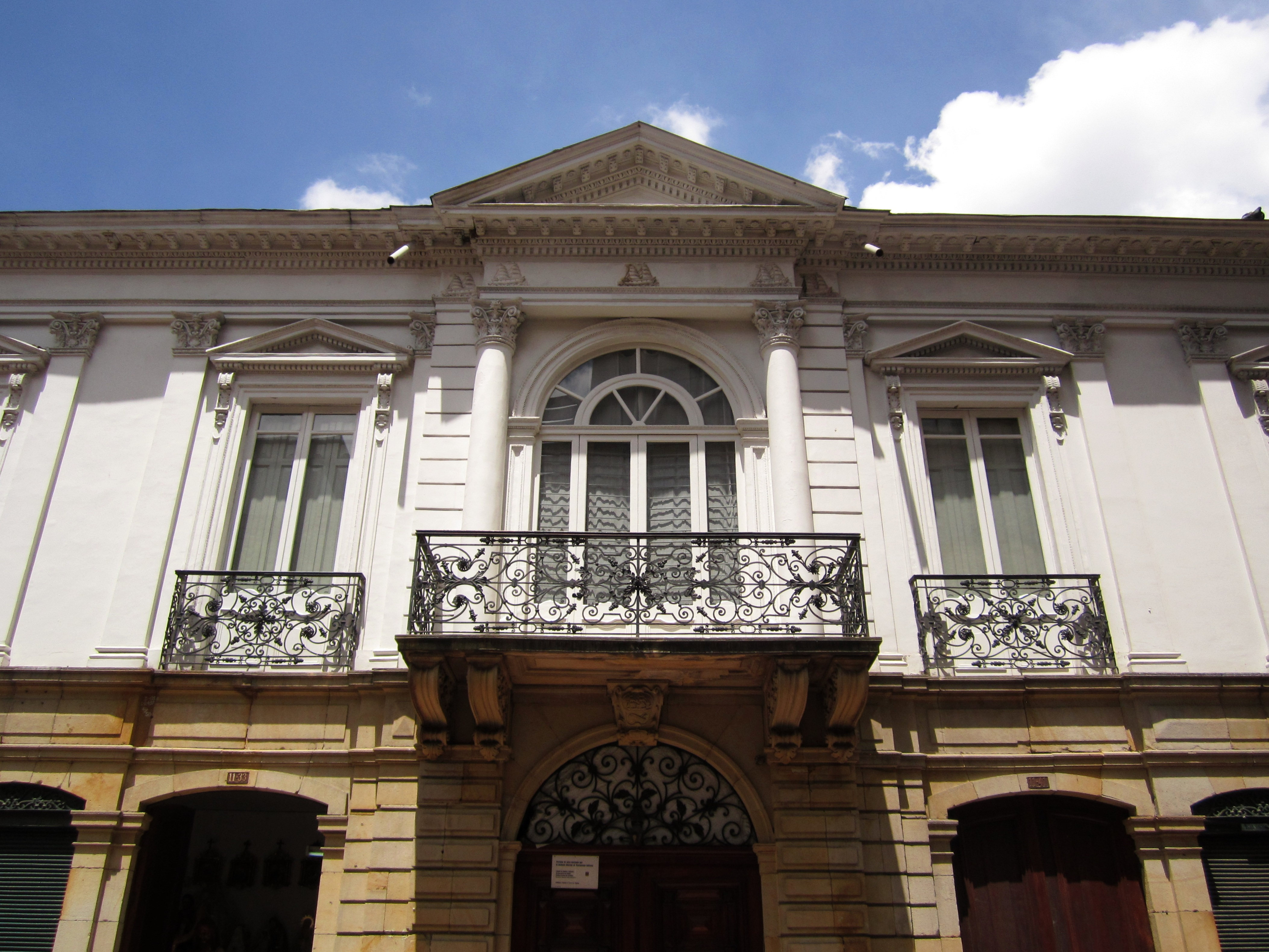 Casa Camacho en La Candelaria, calle 10 con carrera 6. Centro histórico de Bogotá.